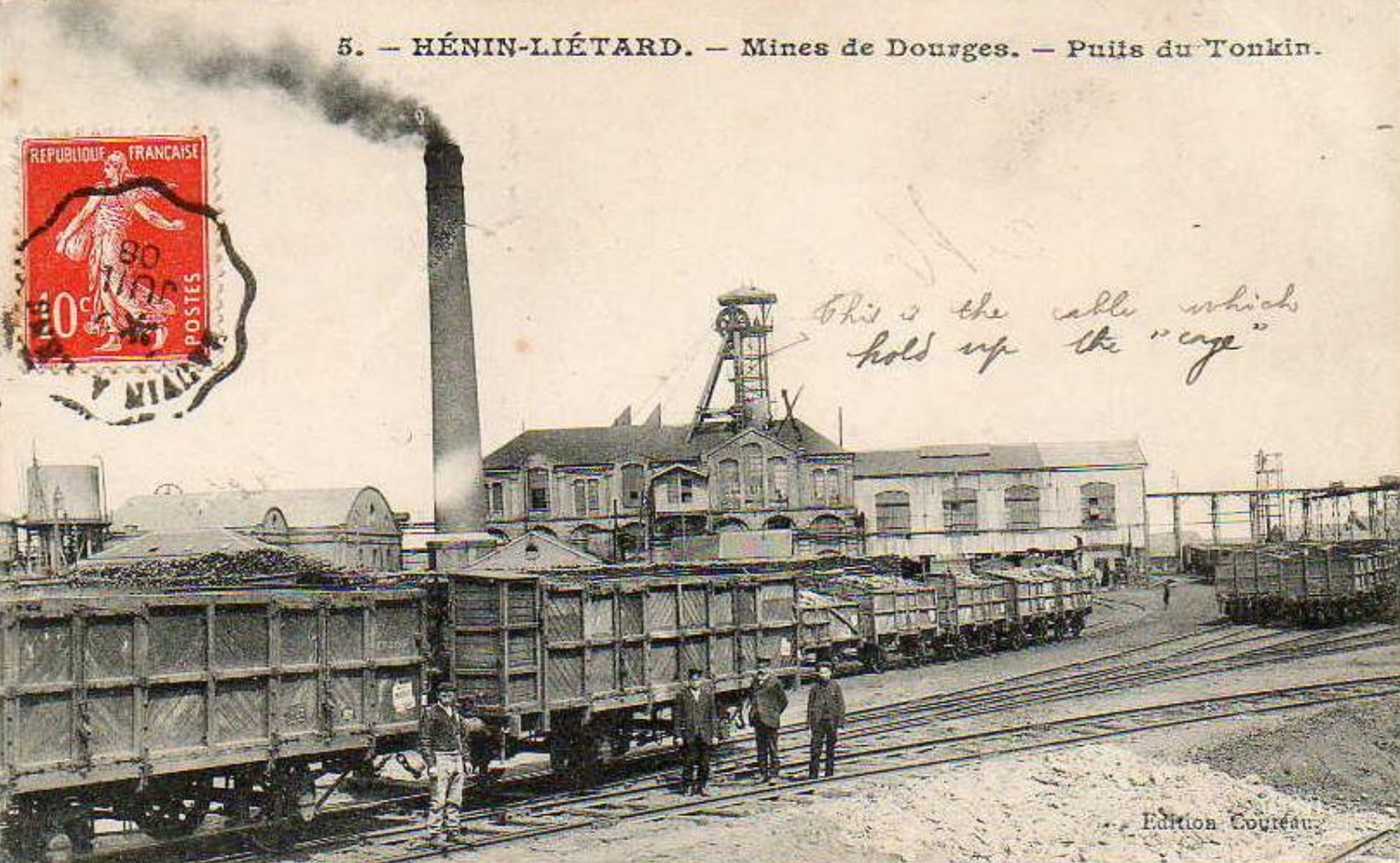 Fosse n° 6 des mines de Dourges